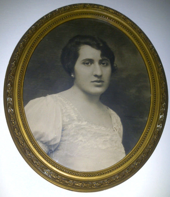 Matilde Díaz Vélez